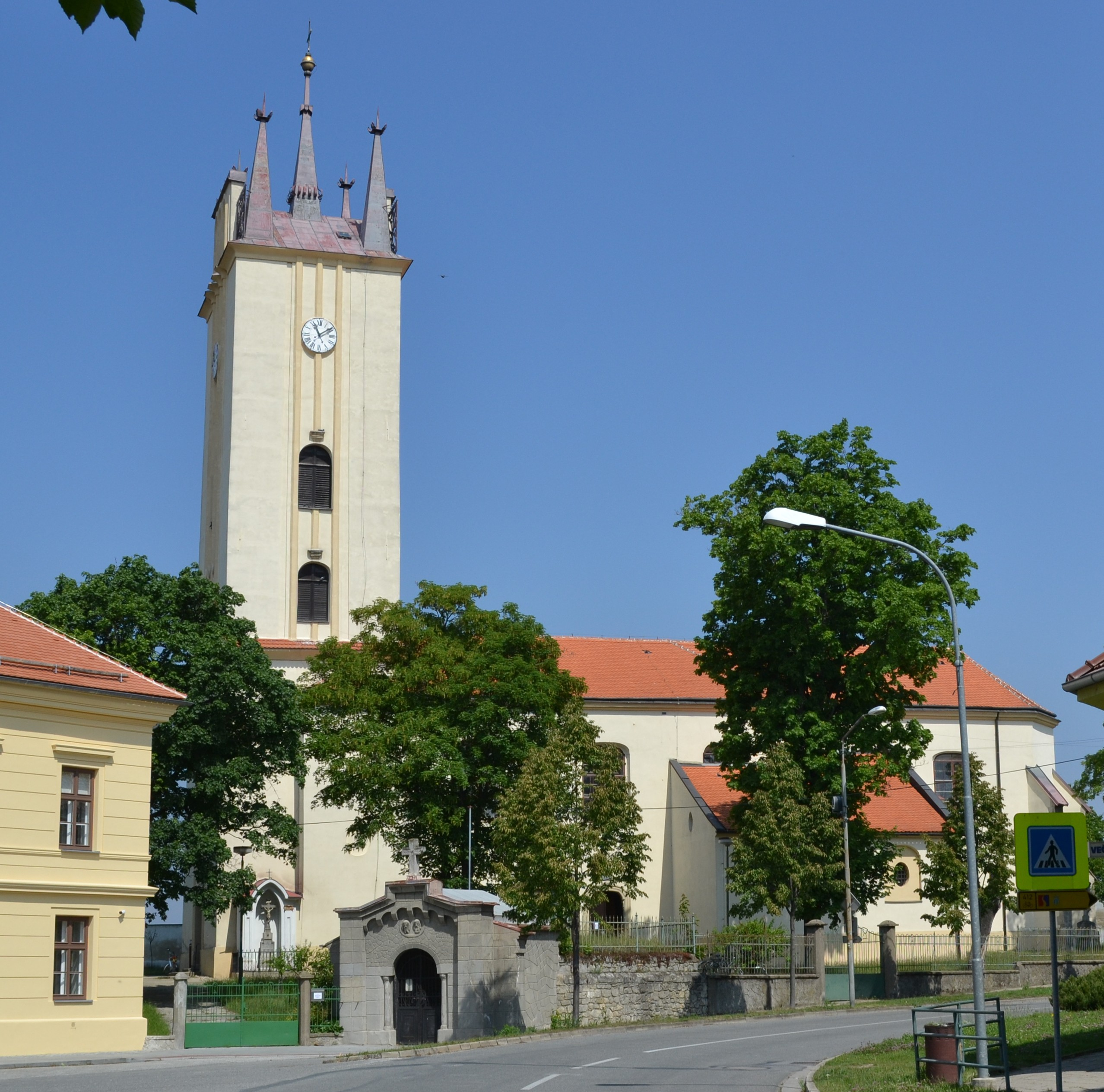 Podivín - Kostel svatého Petra a Pavla